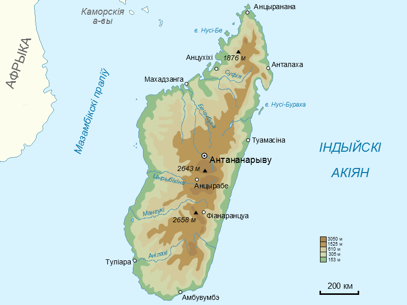 Карта Мадагаскара Беларуская (тарашкевіца): Мапа Мадагаскару